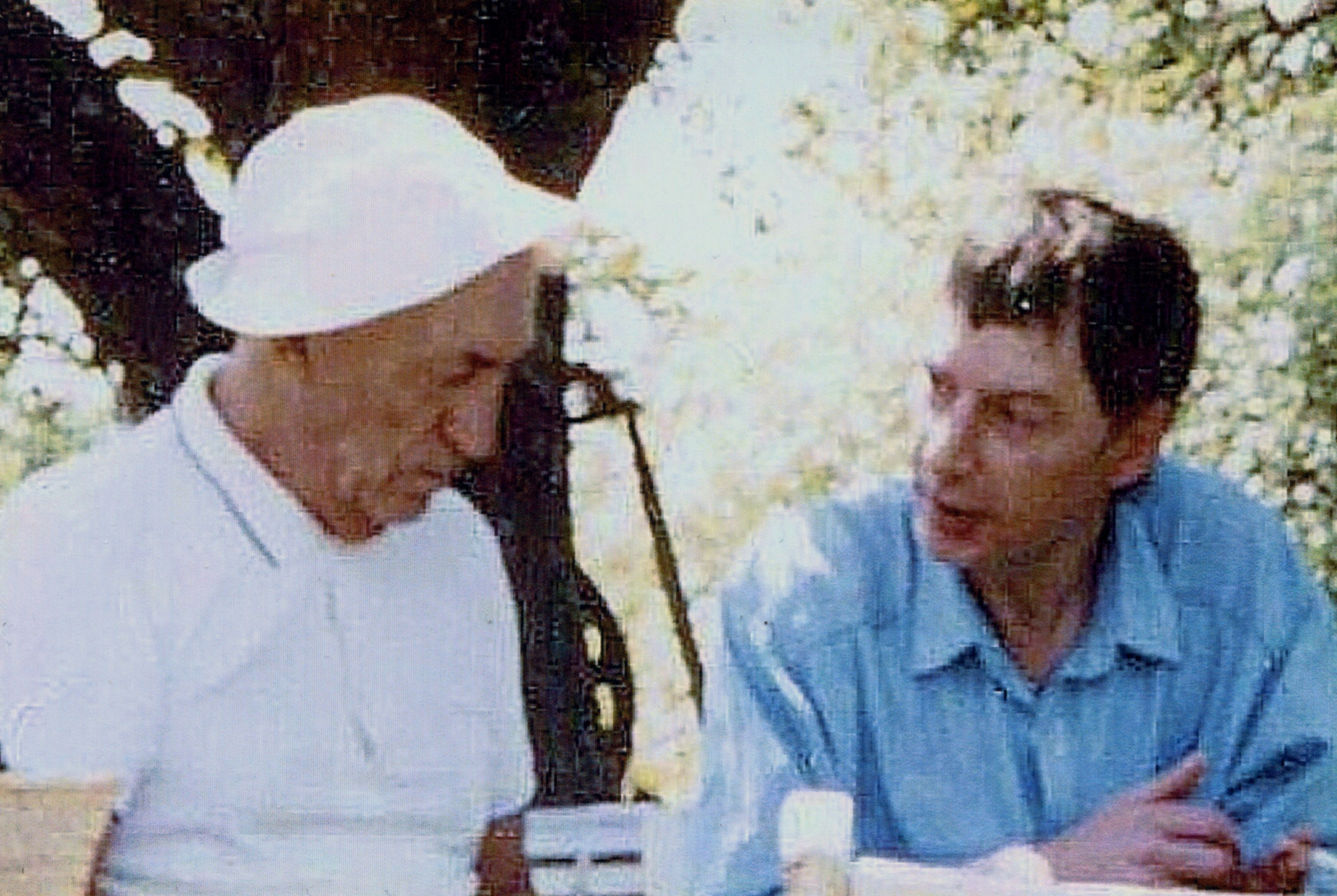 Le poète français Jean Lescure vers 1985